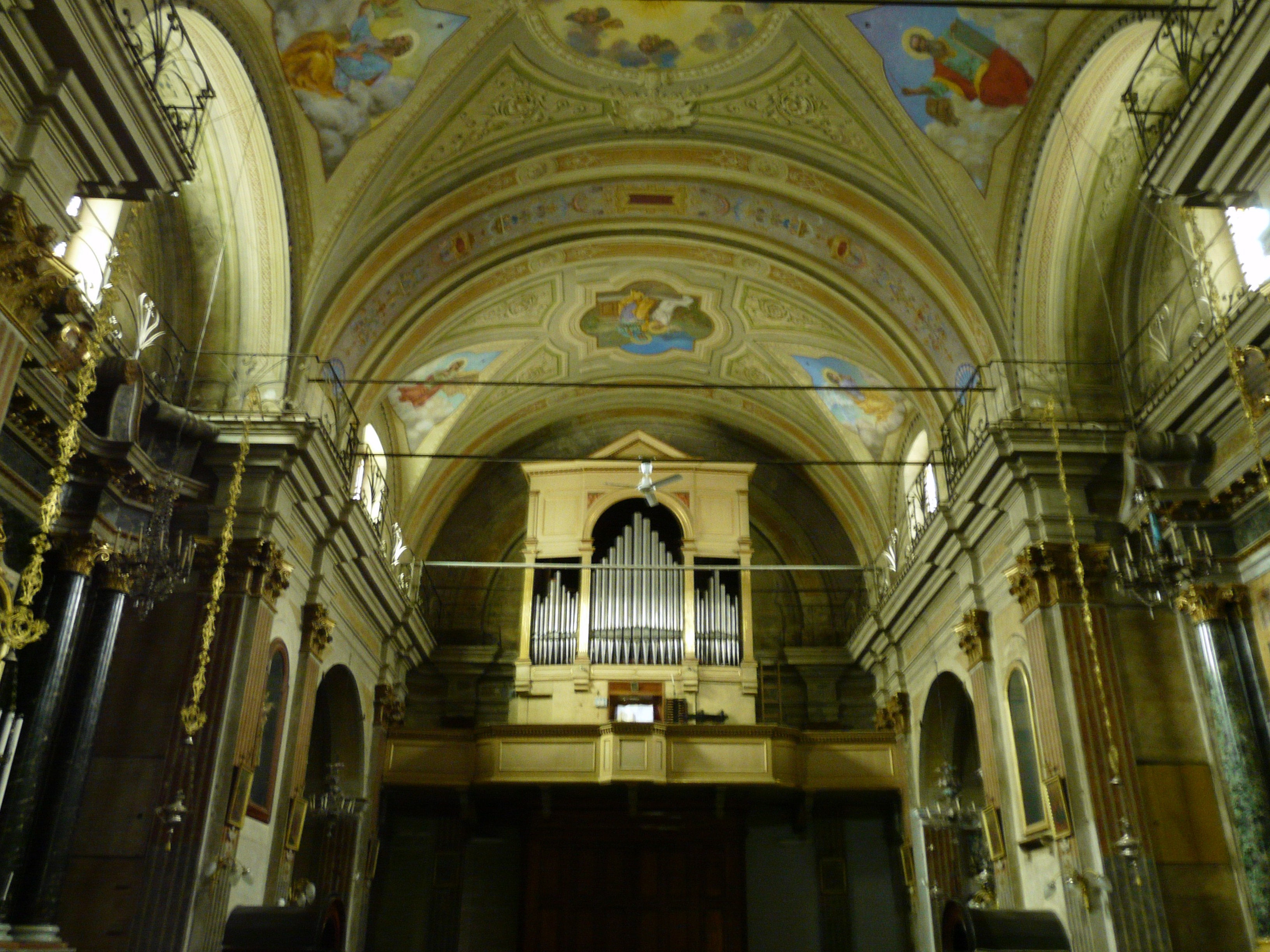 Cantoria e organo della chiesa di Santa Maria, Santa Maria del Taro, Tornolo, Emilia-Romagna, Italia